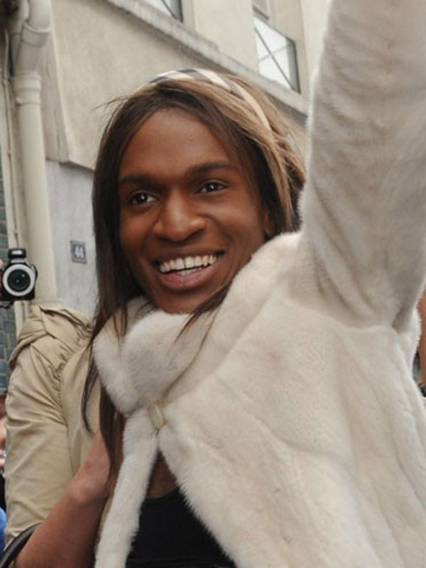 Séance de dédicace à paris